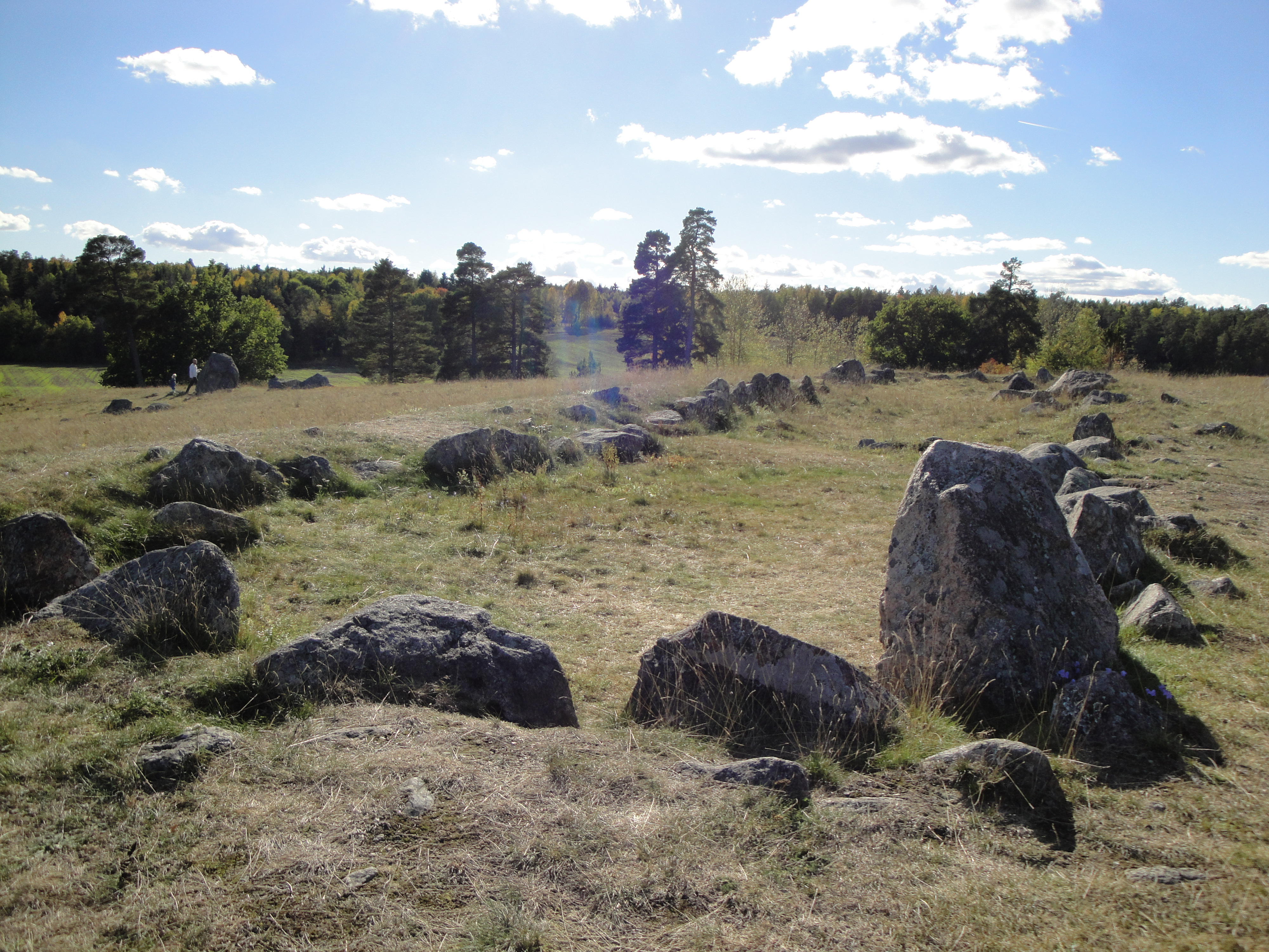 1) Kung Björns kyrka (Uppsala 358:1)